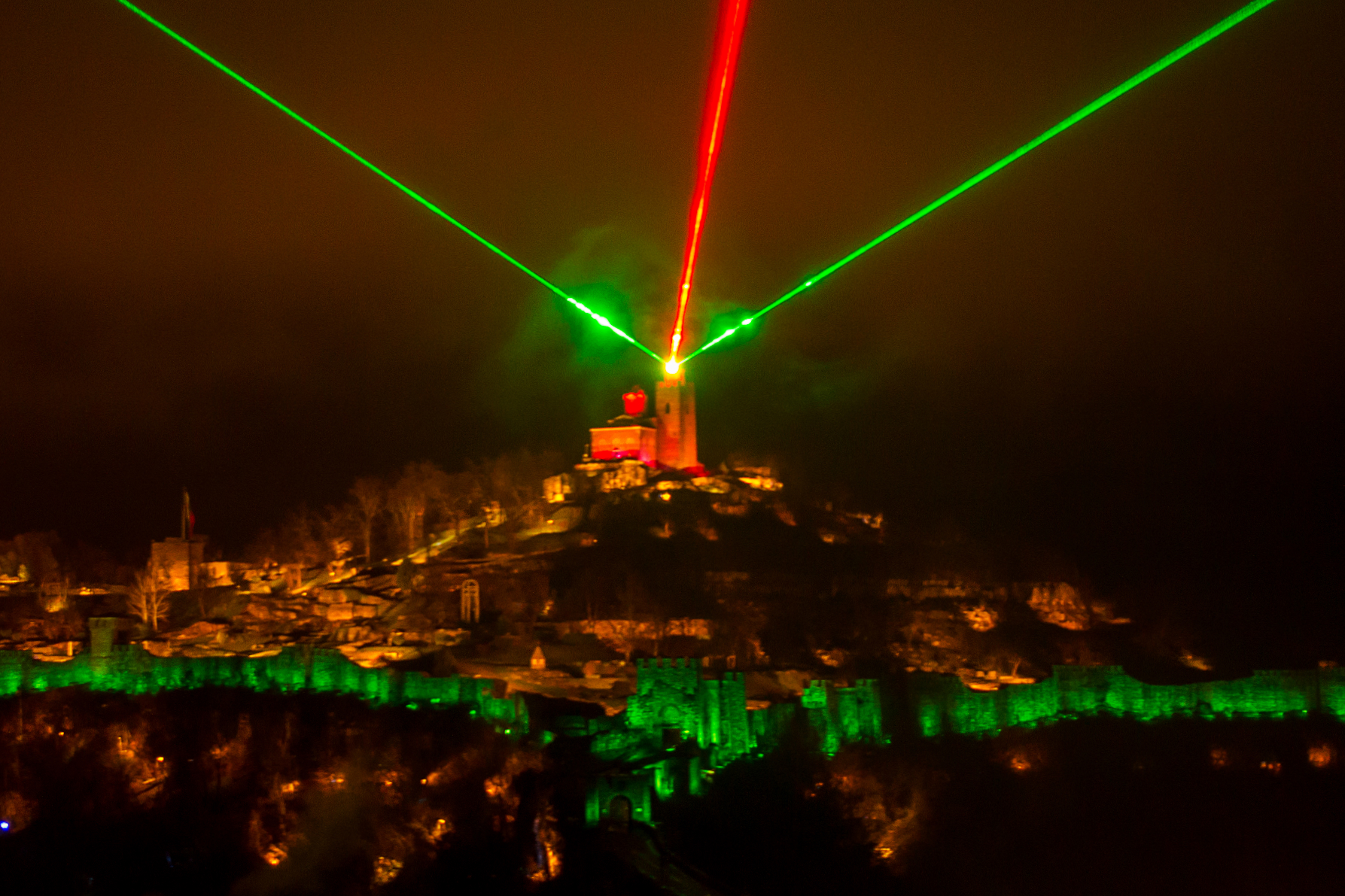 Историческо селище Велико Търново